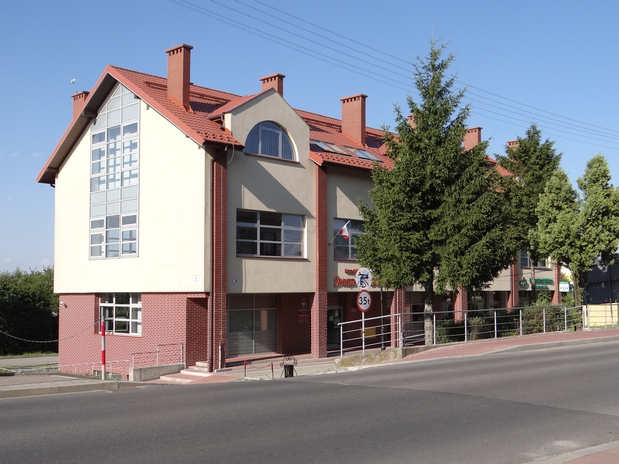 Budynek gminy w Świątnikach Gminnych